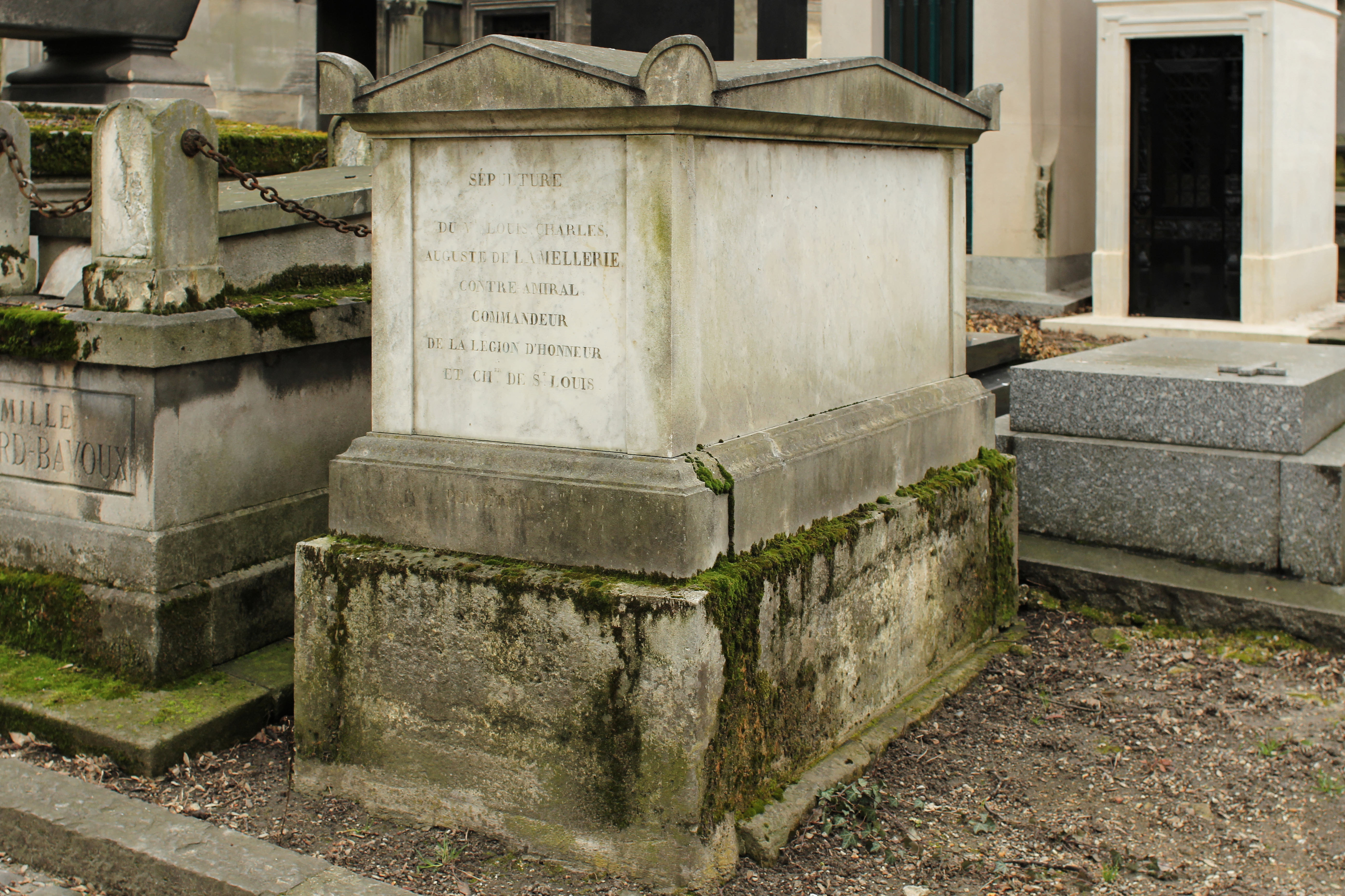 Sépulture de Louis-Charles-Auguste Delamarre de Lamellerie (1771-1840), contre-amiral.